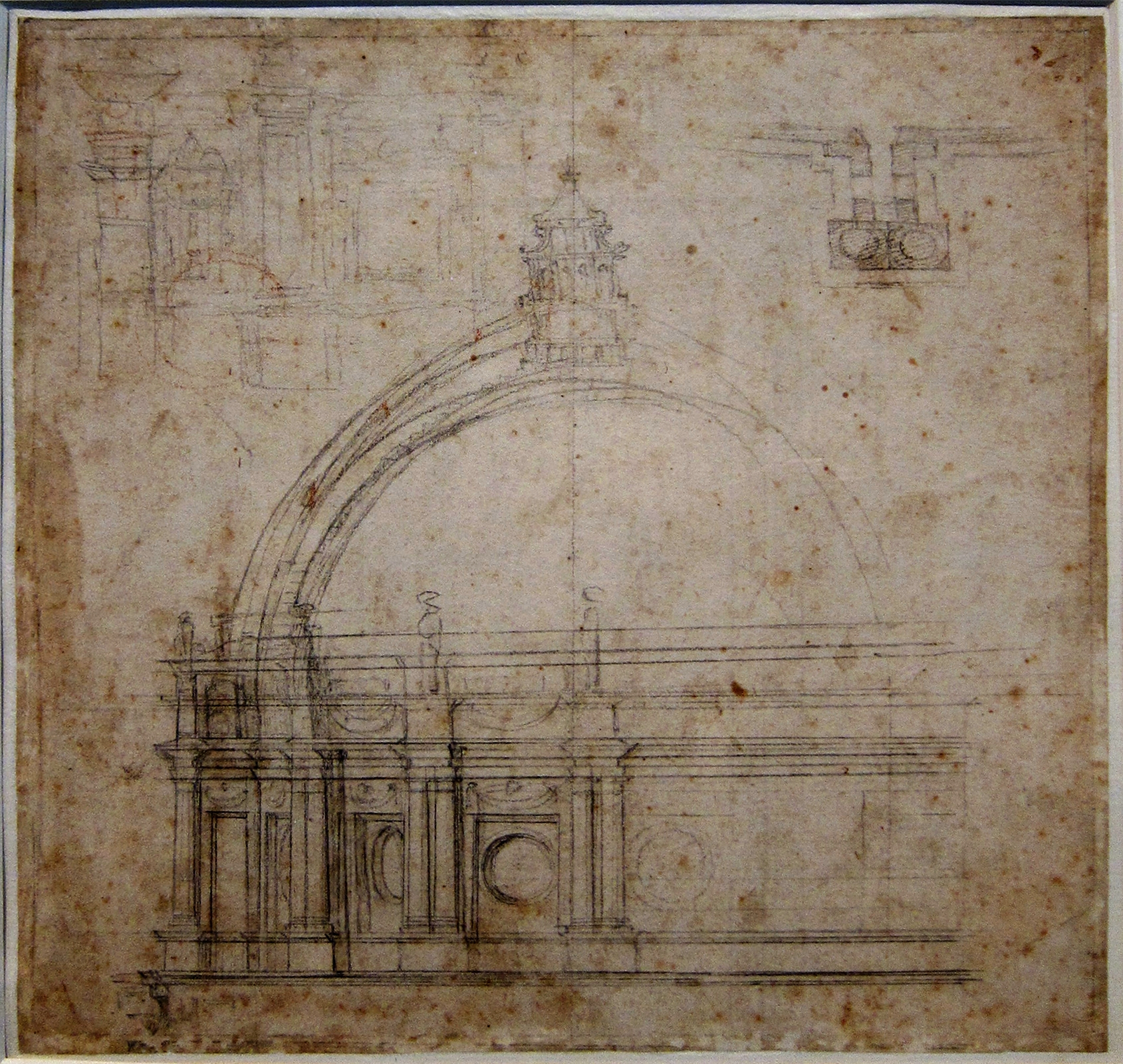 Etude pour le dôme de Saint Pierre au Palais des beaux-arts de Lille.